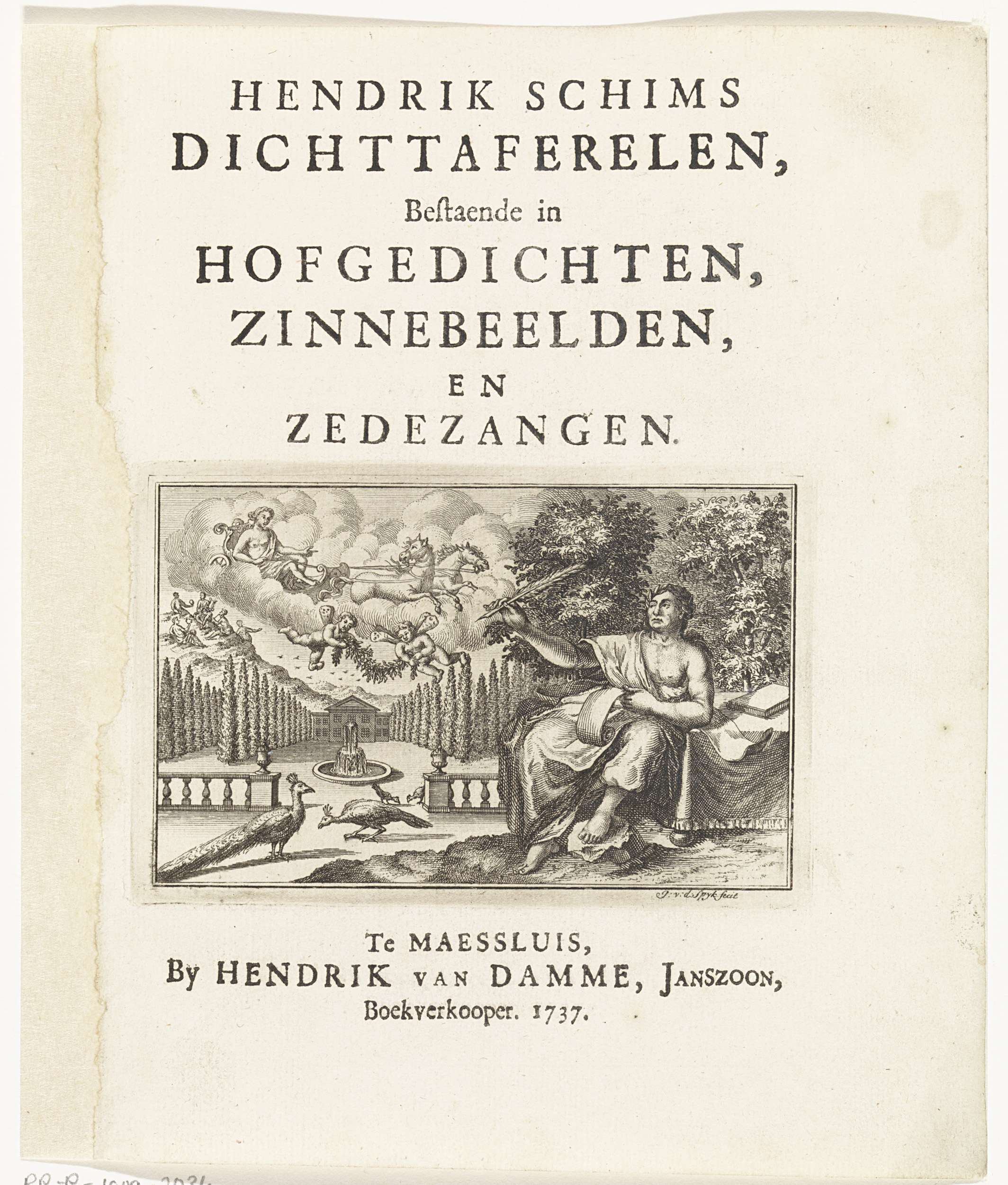 Een schrijver zit in klassieke kledij met een schrijfveer in de hand in een tuin. Hij ontvangt inspiratie. Op de voorgrond lopen twee pauwen. Aan de hemel verschijnt Venus in haar wagen. Links de Olympus met Apollo en de muzen.; Iconclasscode: 48C91; Iconclasscode: 92B3731; Iconclasscode: 92C4; Iconclasscode: 25F35(PEACOCK); print; titelpagina